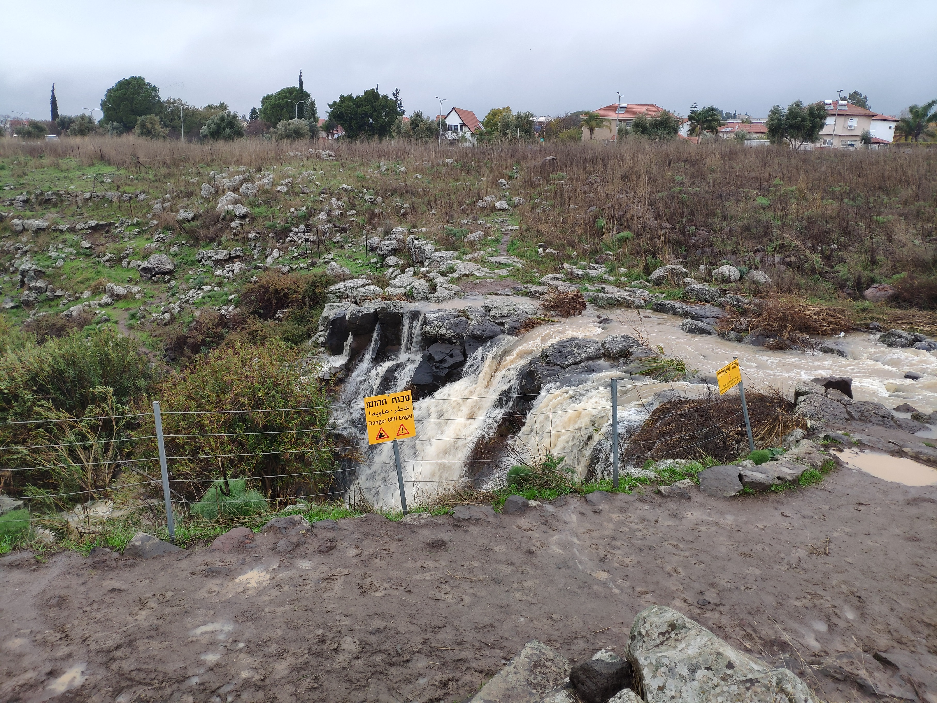 המפל בנחל קצרין, 19 בינואר 2020